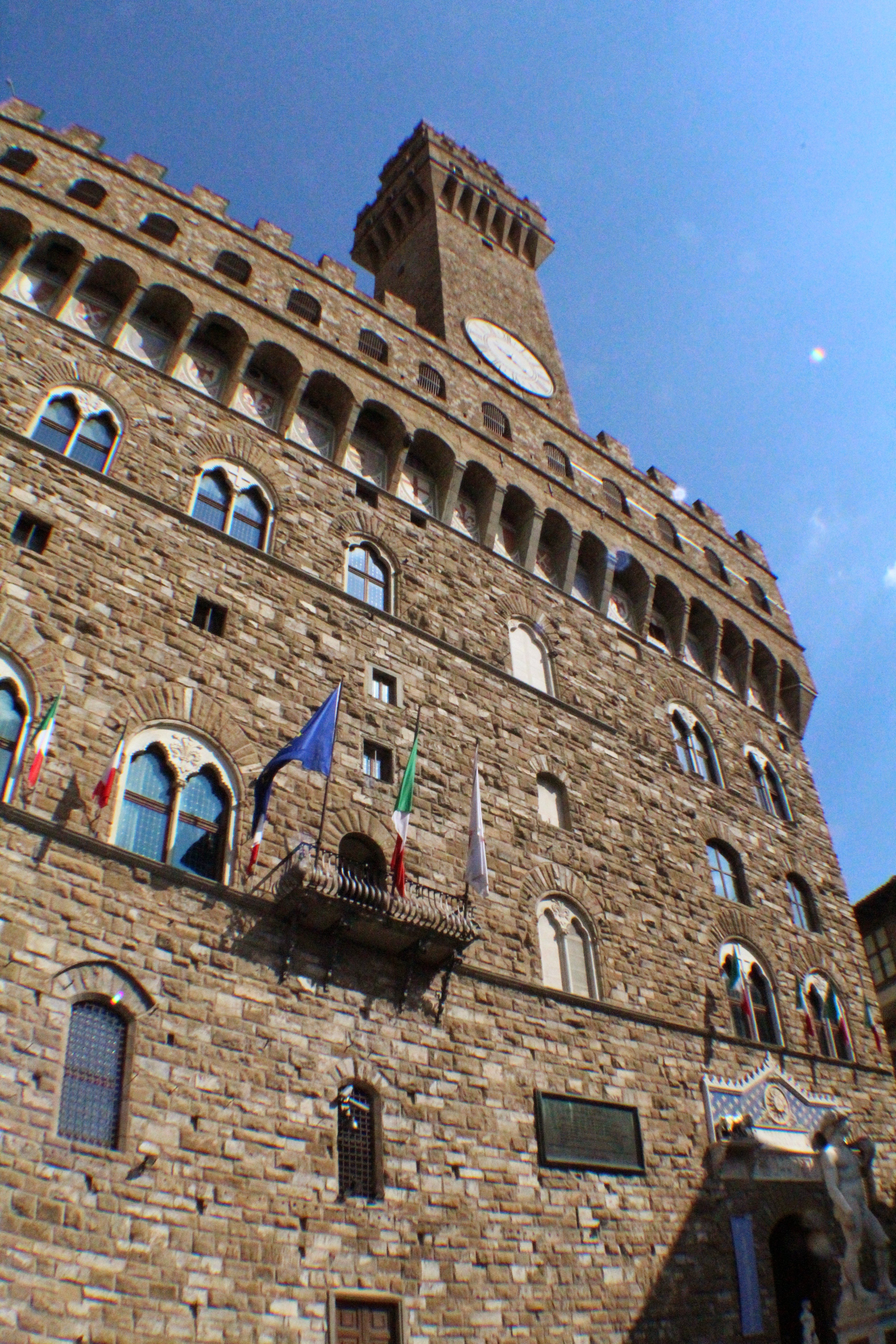 Florencia, Italia